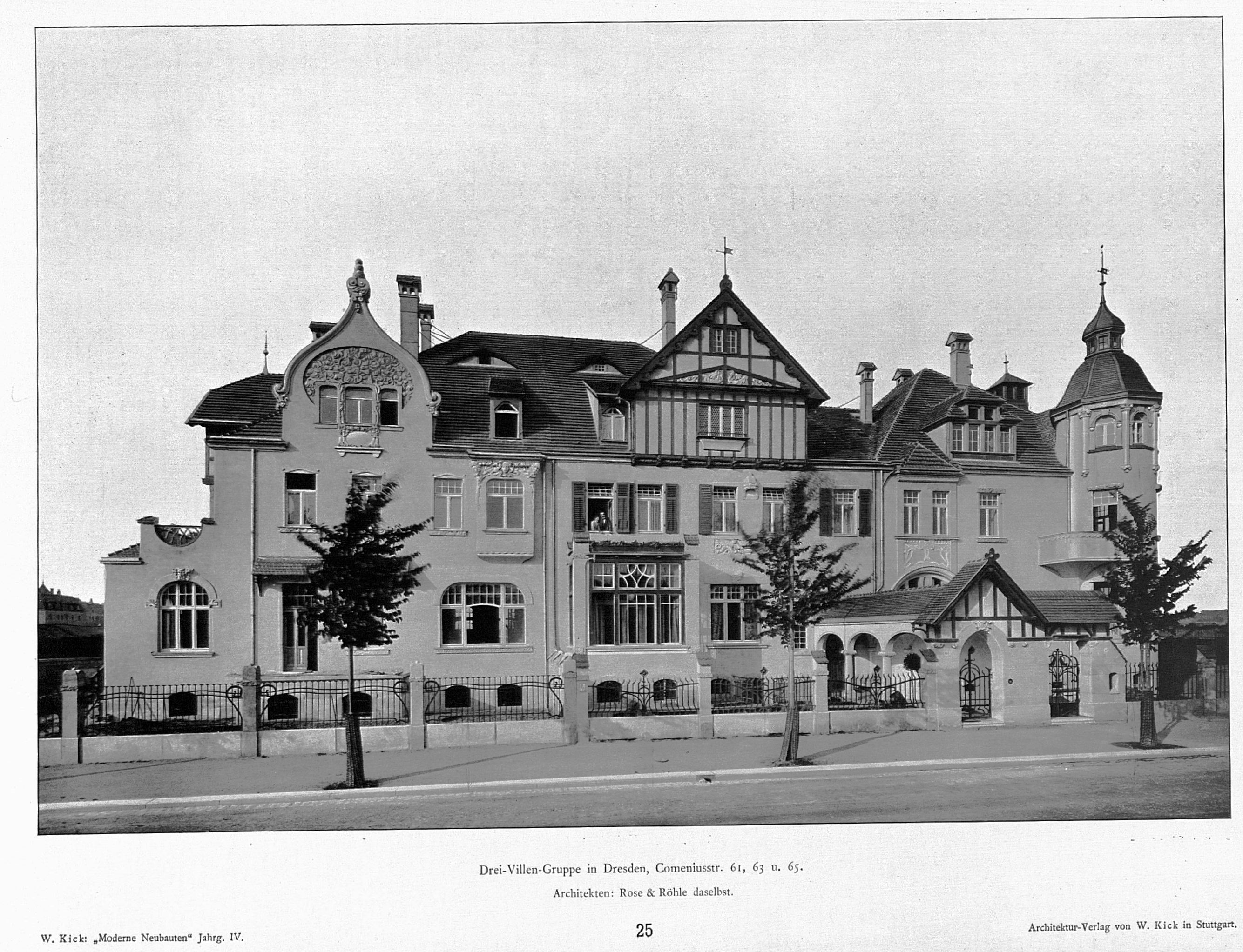 Drei-Villen-Gruppe in Dresden, Comeniusstraße 61, 63 und 65, Architekten Rose & Röhle (Dresden)